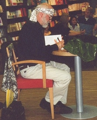 Terry Pratchett bei einer Lesung und Signierstunde in der Koblenzer Buchhandlung Bouvier, 26. September 2000